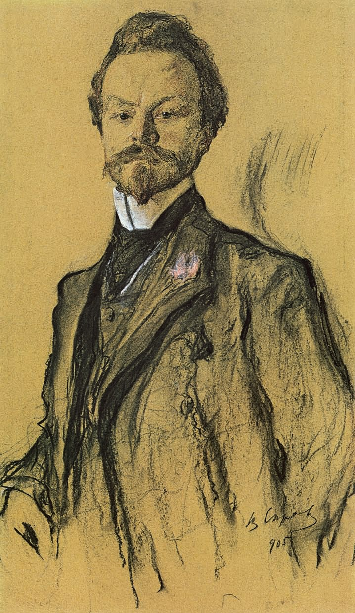 Valentin Serov: Portrait of the Poet Konstantin Balmont. 1905. Pastel on paper mounted on cardboard. The Tretyakov Gallery. В. Серов. К.Д. Бальмонт. 1905. ГТГ. Бумага, уголь, пастель, сангина, мел. Исполнен по заказу Н.П. Рябушинского для журнала "Золотое руно".